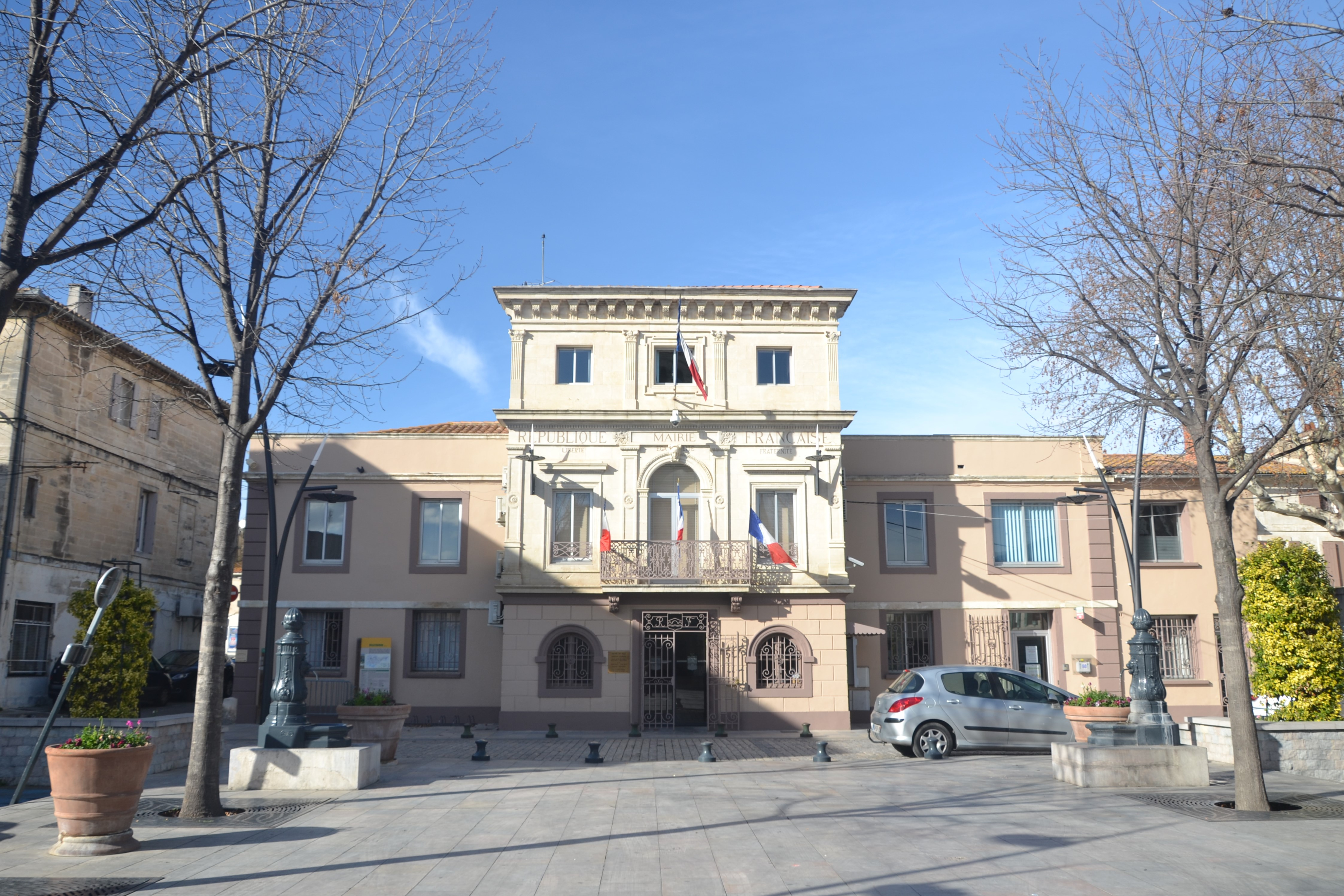 Mairie de église de Bellegarde